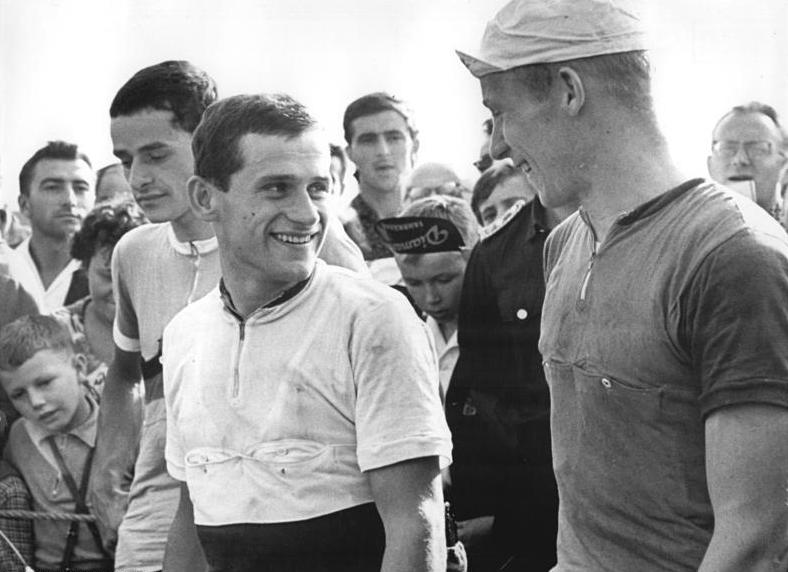 Siegfried Huster, Axel Peschel Zentralbild Gahlbeck Ma.25.7.1966 Hohenstein-Ernstthal: Deutsche Meisterschaften im Straßenfahren. Siegfried Huster (SC Karl-Marx-Stadt, Mitte) wiederholte am 24.7.1966 bei den deutschen Meisterschaften im Straßenfahren auf dem Sachsenrin seinen Erfolg vom Vorjahre. Mit 4:44:17 st für die 194 km lange Distanz ließ er Jürgen Exner (ASK Vorwärts Leipzig, links dahinter) um acht Sekunden hinter sich. Dritter wurde Freidensfahrt-Teilnhemer Axel Peschel (SC Dynamo Berlin) - rechts-.